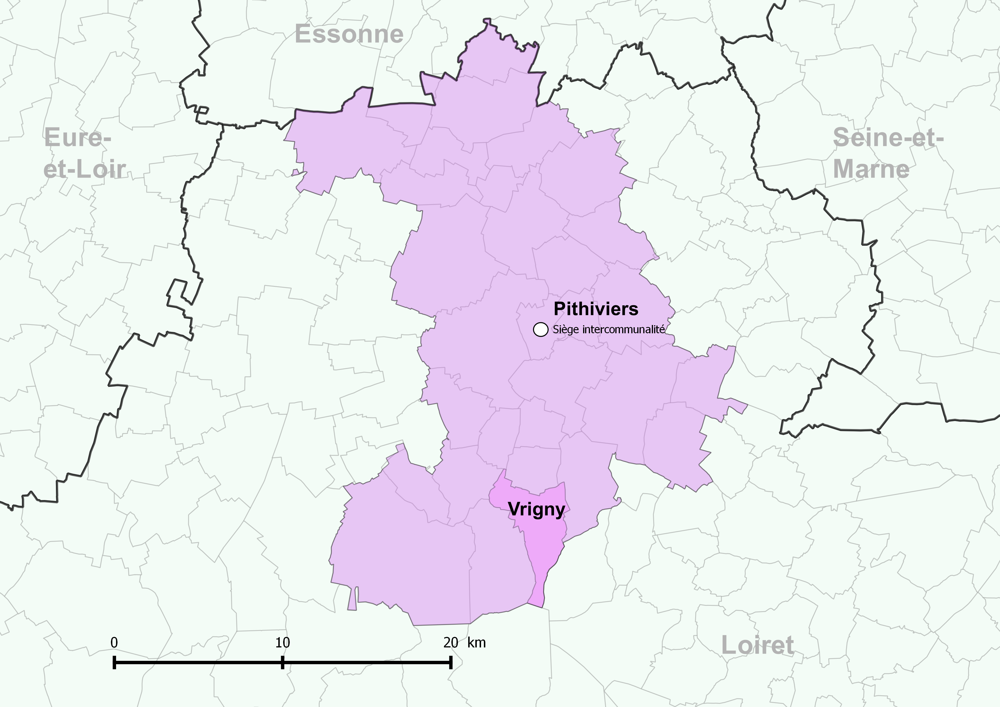 Périmètre de la communauté de communes du Pithiverais - Positionnement de la commune de Vrigny.